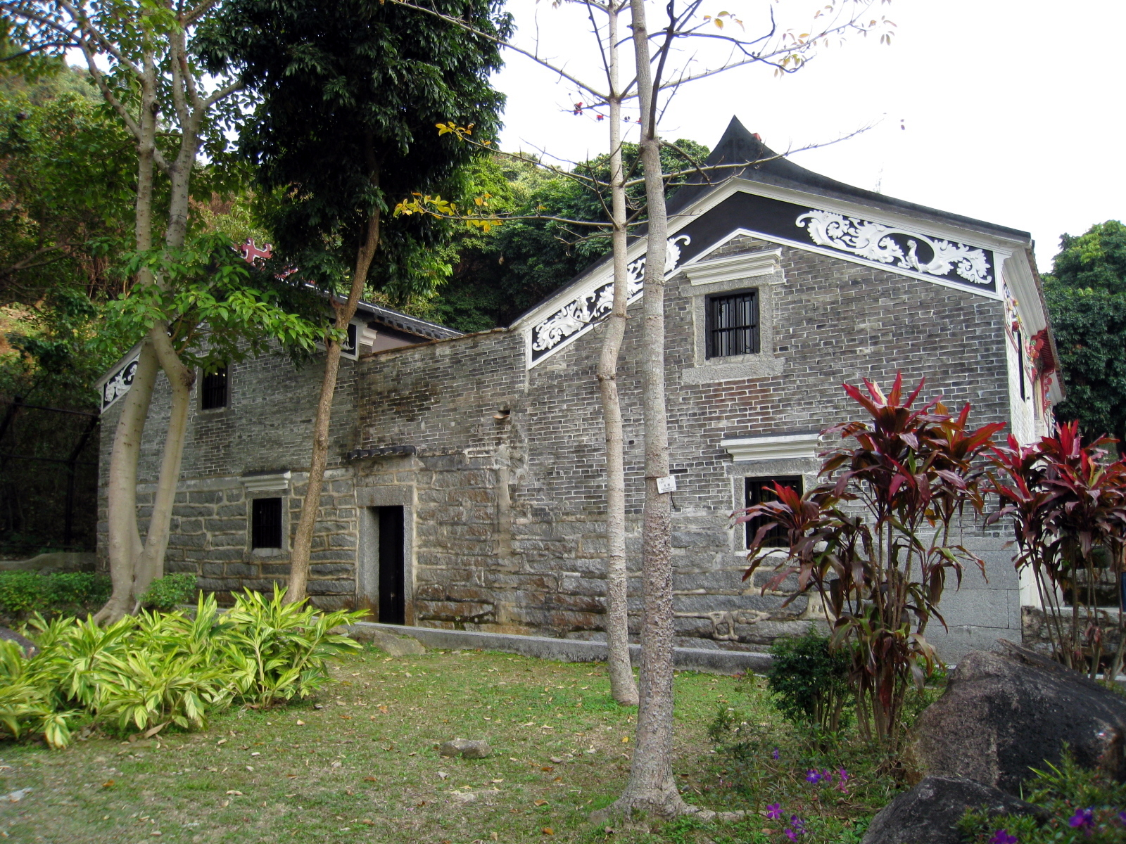 HK Wong Uk Village Side Wall